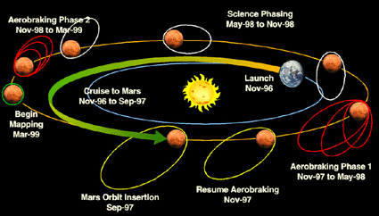 Tomada de y ésta de